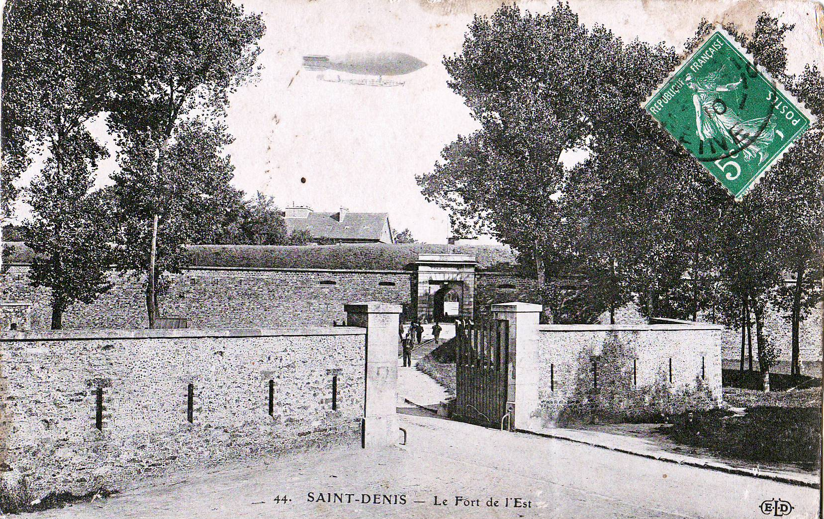 Carte postale ancienne éditée par ELD, N° 44SAINT-DENIS (Seine-Saint-Denis - France) : Le Fort de l'Est